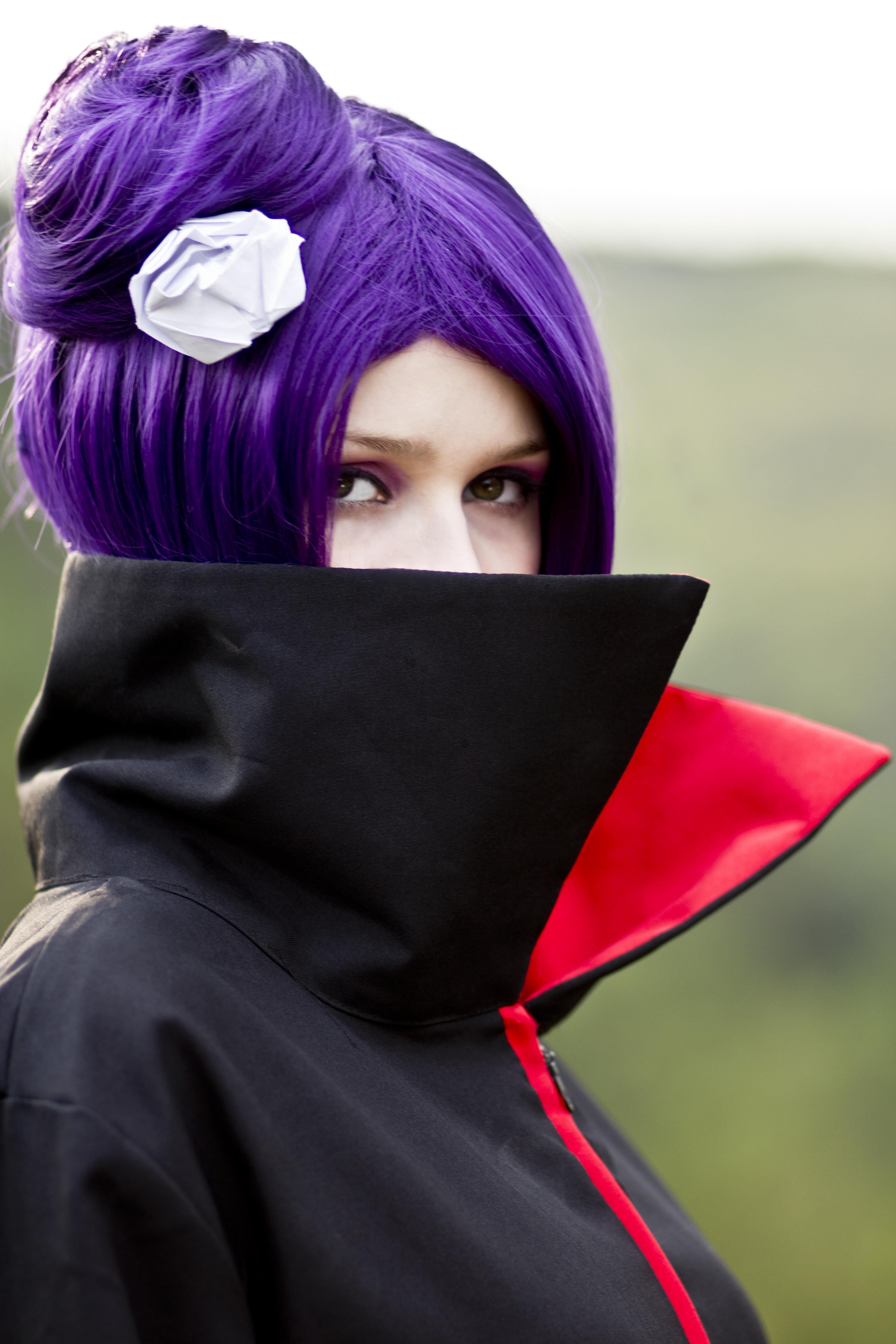 Konan